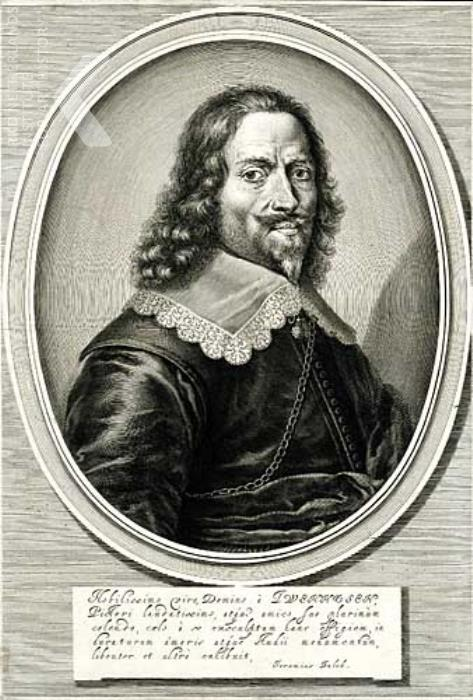 Portret Helmich van Thweenhuysen II według Jeremiasz Falcka, 315 x 215 mm, 1646-1655, British Museum, London (England) , inv./cat.nr 1933,1209.21